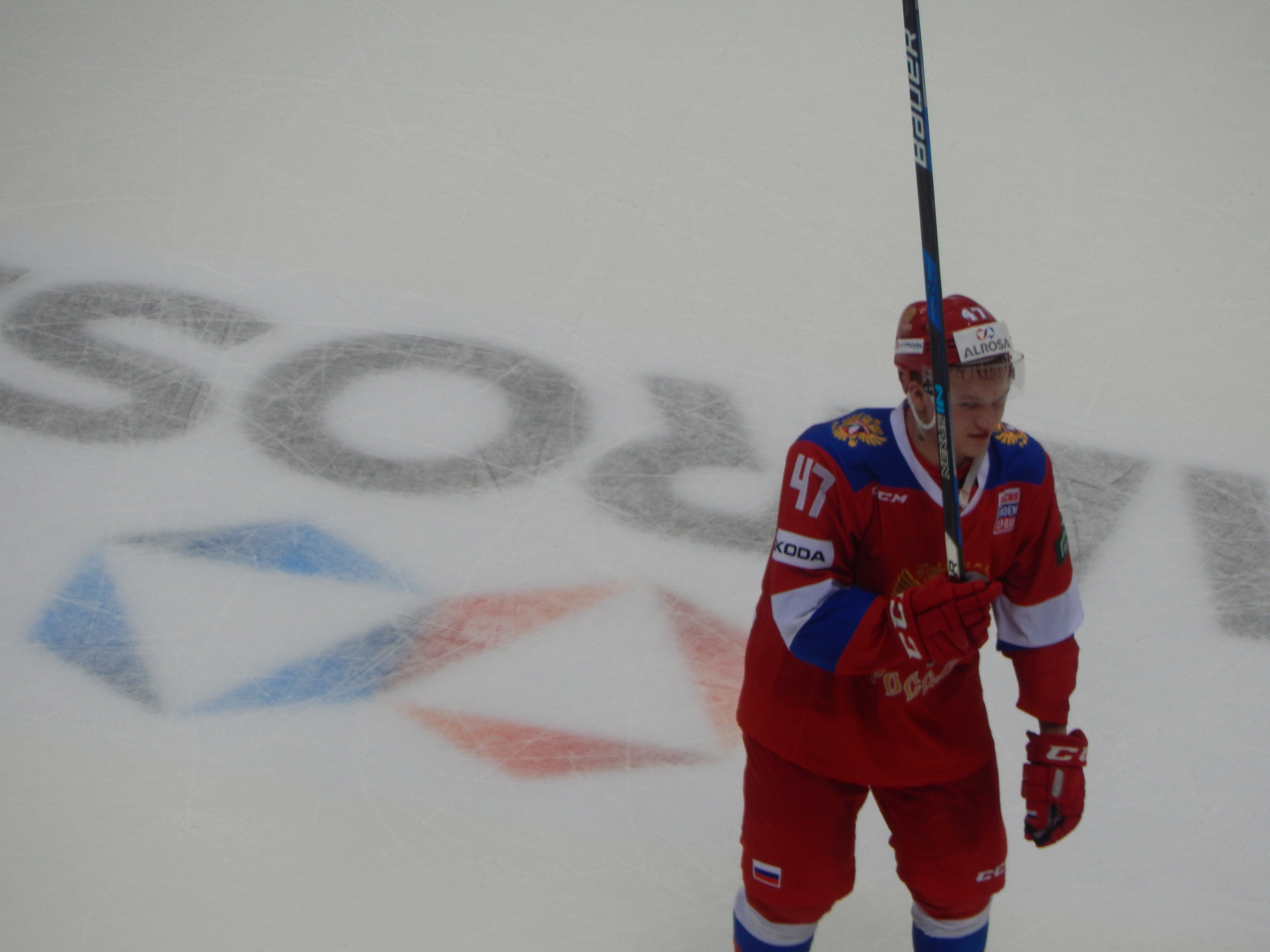 Кубок Первого Канала 2017, матч Россия - Канада (16 декабря 2017) Кирилл Капризов